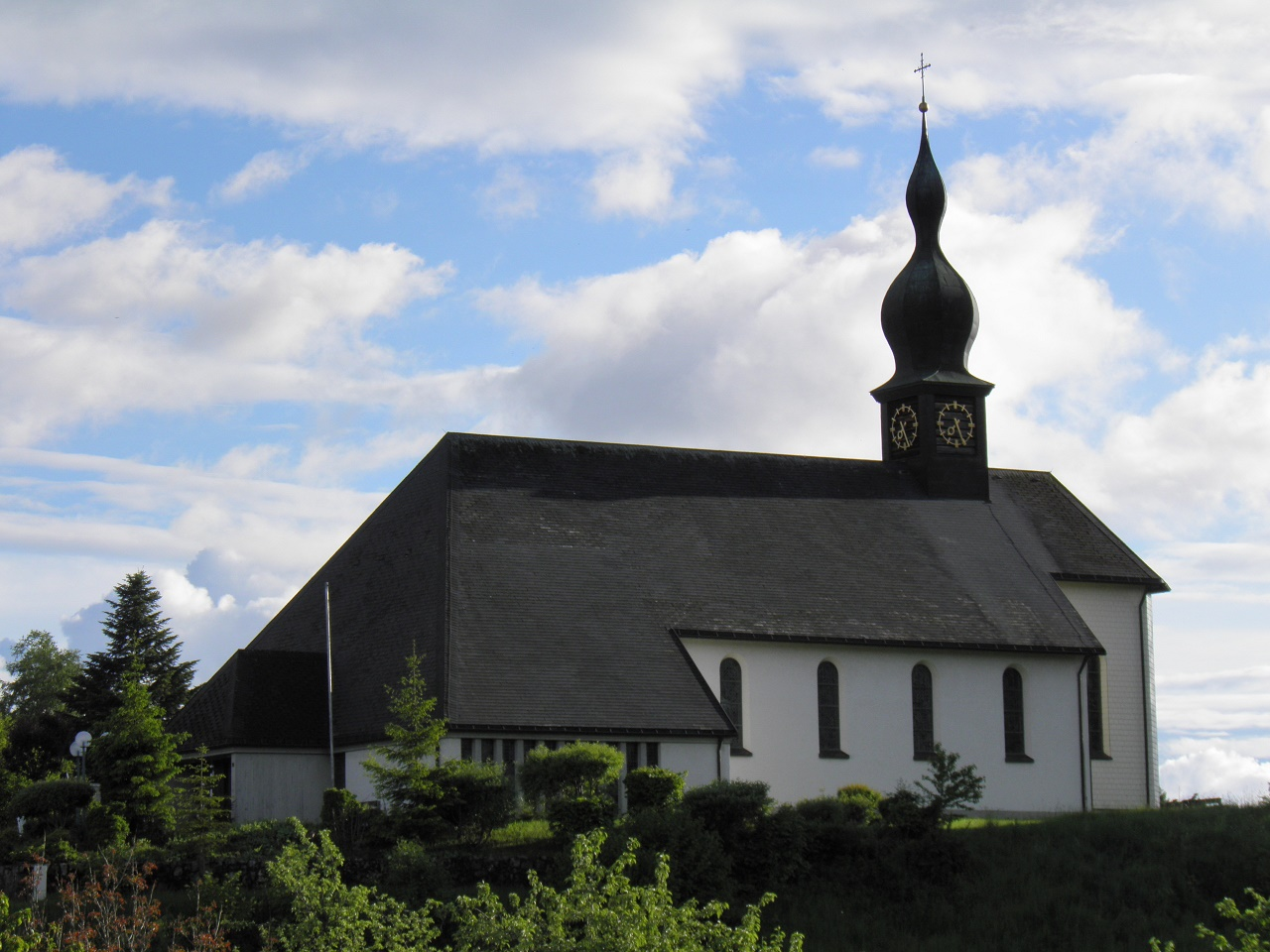 Kirche st. Fridolin Häusern